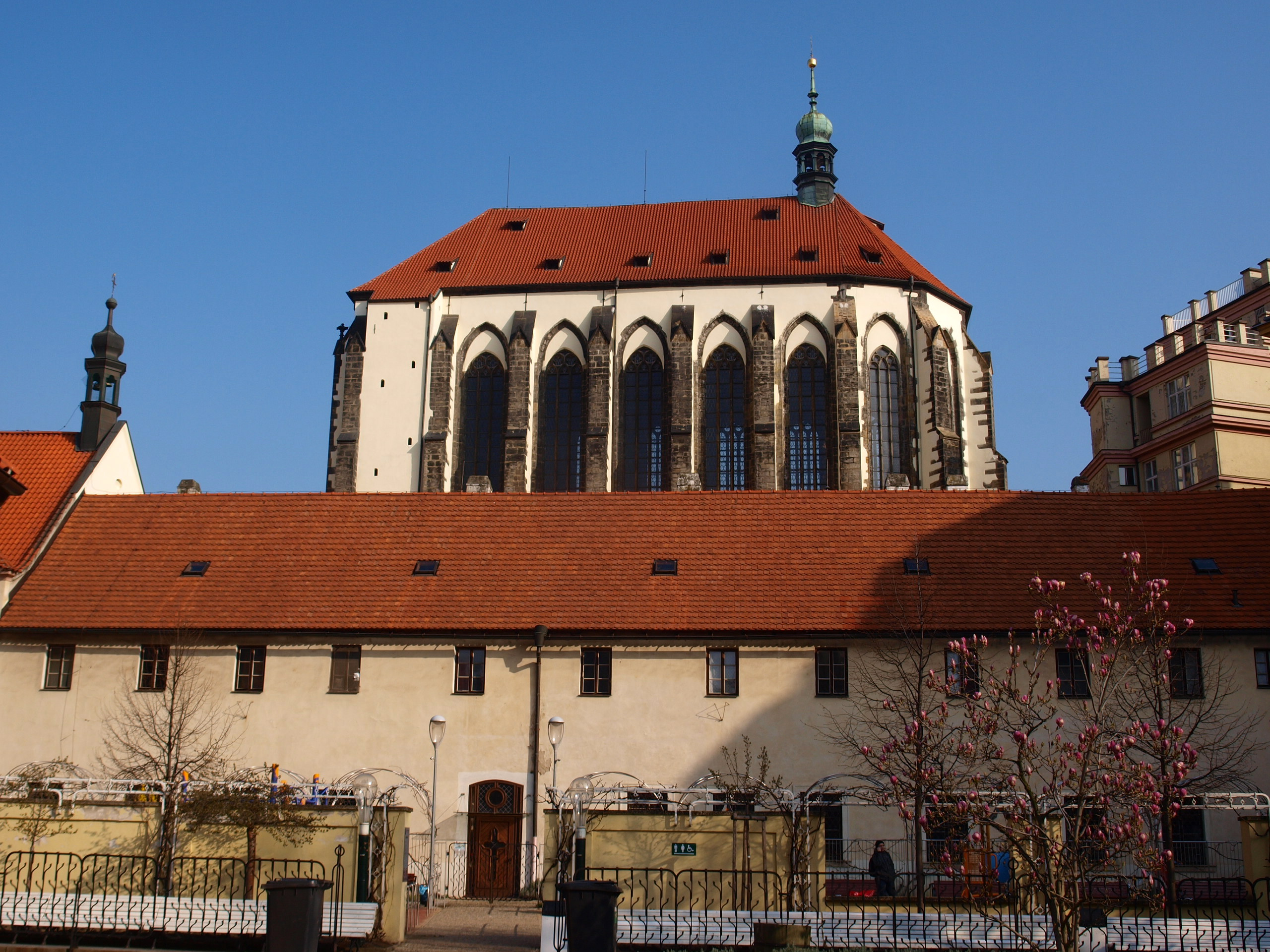 Praha, kostel Panny Marie Sněžné